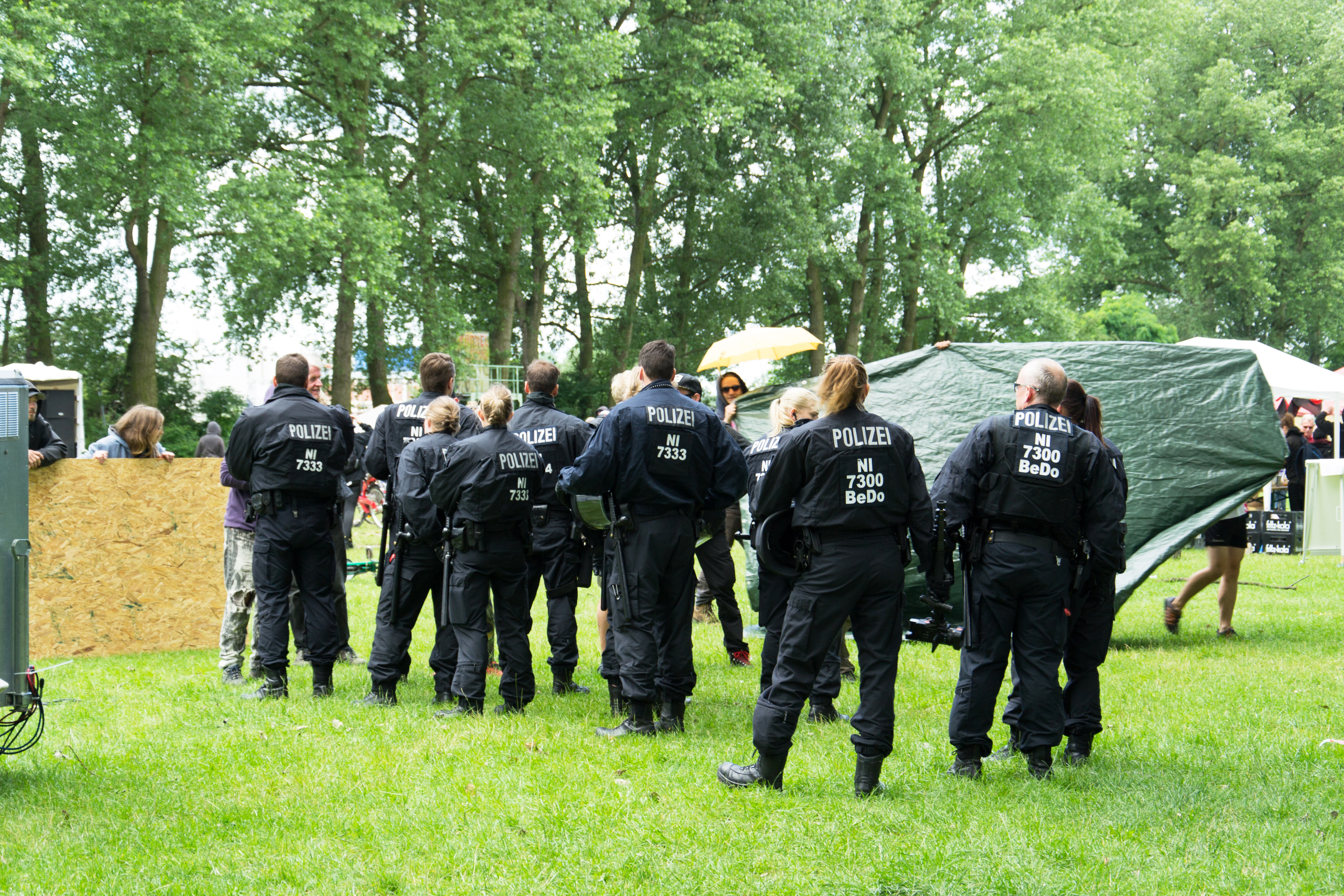 Die Polizei inspiziert das G-20 Protestcamp Elbpark Entenwerder nach der gewaltsamen Räumung vom 2. Juli 2017